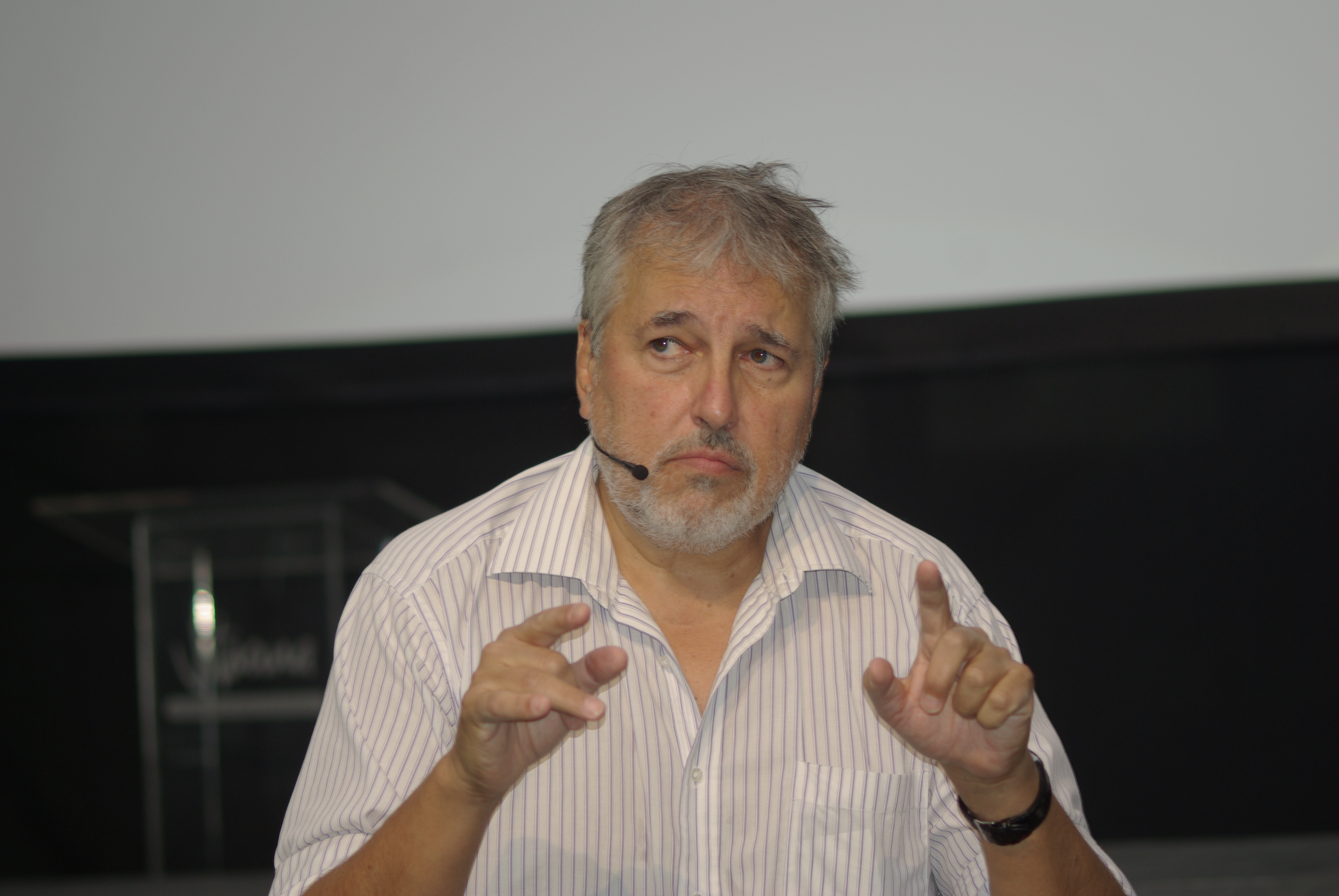 El escritor chileno Jaime Collyer en la primera Feria del Libro de Vitacura; Casas de Lo Matta, 26 de abril de 2015